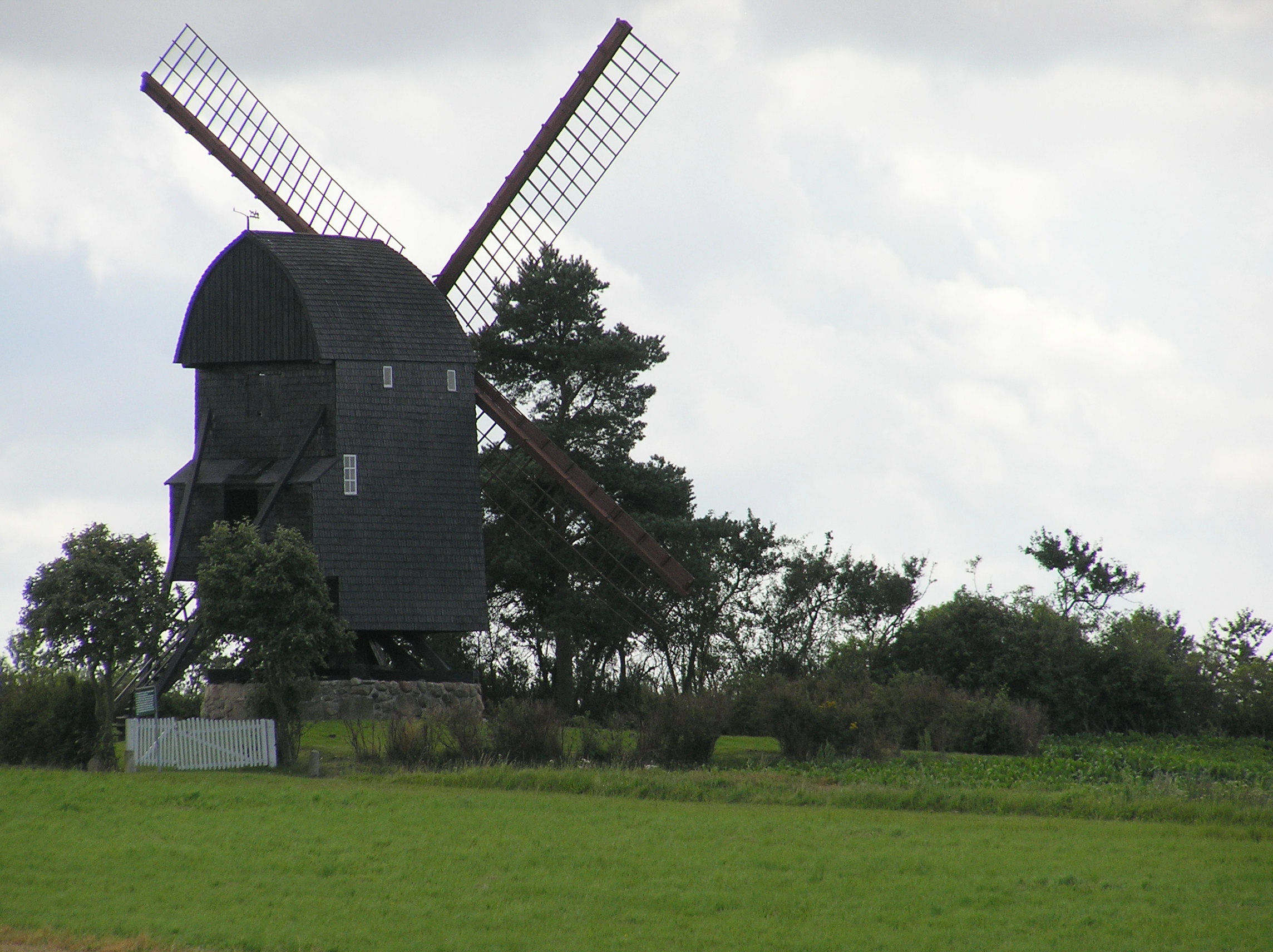 Som nabo til Torkilstrup Kirke. ligger Torkilstrup Mølle som er en Stubmølle. Møllen er opført før 1655 og blev ombygget 1743. Den var i brug indtil 1945. Fredet 1959. Den står stadig på det sted, hvor den blev bygget.